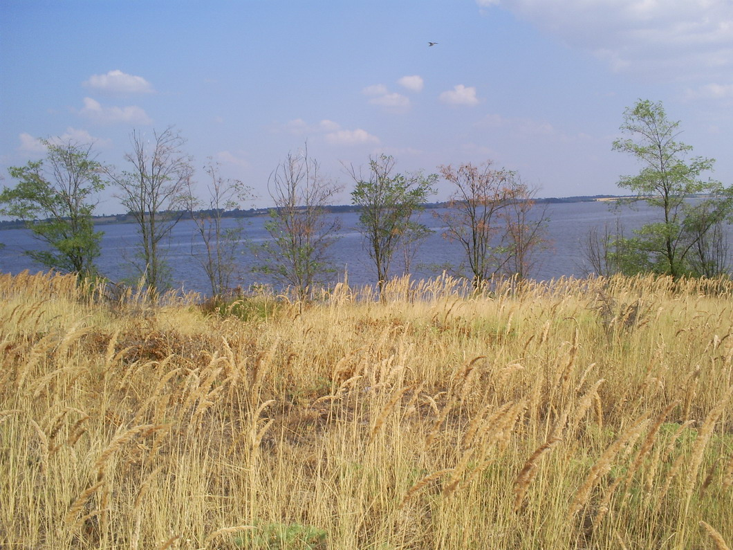 Вештачко језеро Језиорско. Поглед са централног дела острва на другу обалу. (Пољска) 25.07.2006. Author:Jovan Vuković If you need this picture with biger rezolution ask me there.